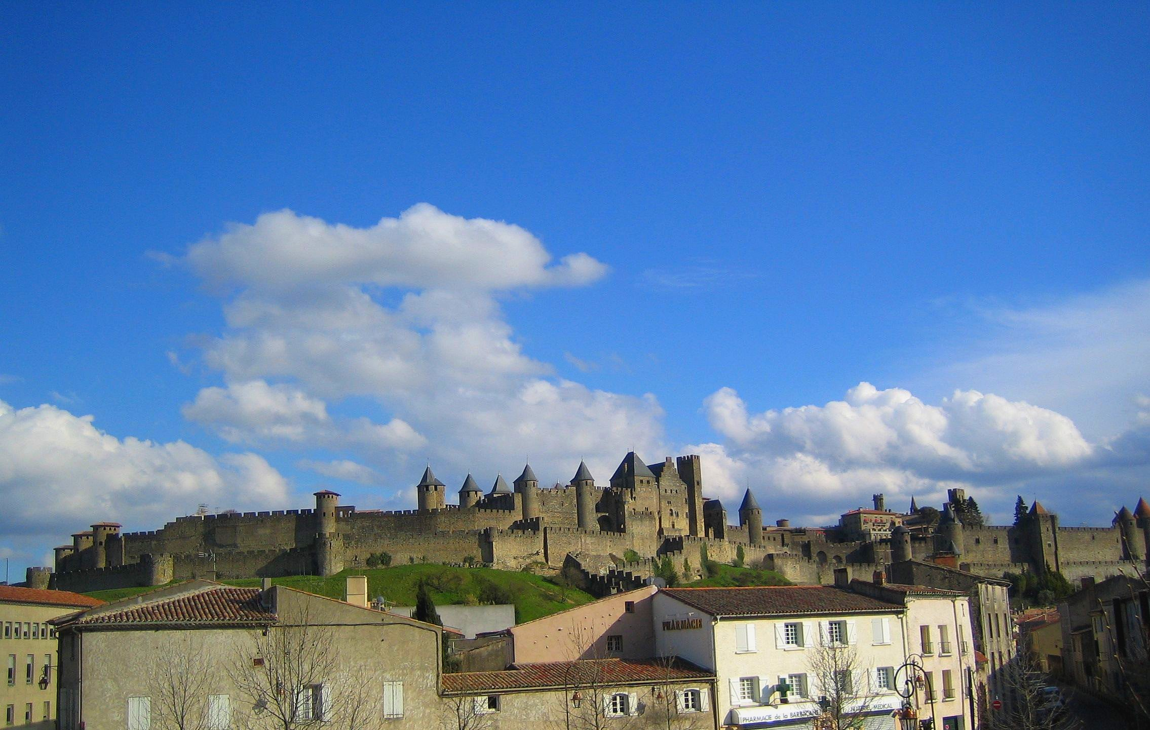 La cité médiévale de Carcassonne